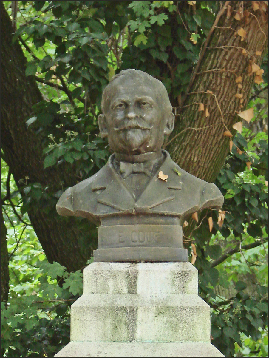 Monument à Emile Coué dans le parc Sainte-Marie. "Ce n'est pas la volonté qui nous fait agir mais l'imagination. L'autosuggestion consciente nous donne la maîtrise de nous même" Emile Coué Pharmacien et psychothérapeute français, né à Troyes en 1857, mort à Nancy en 1926. Connu dans le monde entier pour sa méthode de guérison par autosuggestion qui porte son nom, il s'installe à Nancy comme psychologue et psychothérapeute de 1902 à 1925.